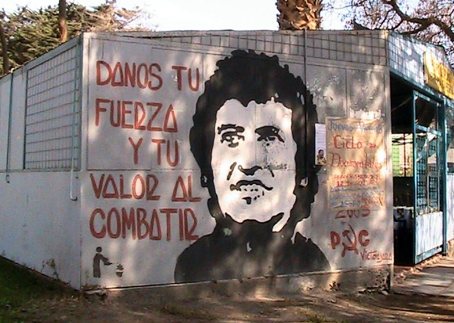 Grafiti con el rostro del cantautor chileno Víctor Jara. V Congreso Chileno de Psicología & 1 Congreso Andino de Psicología. 6 al 8 de octubre de 2010, Arica, Chile. Organizado por las Escuelas de Psicología del Consorcio de Universidades del Estado de Chile.